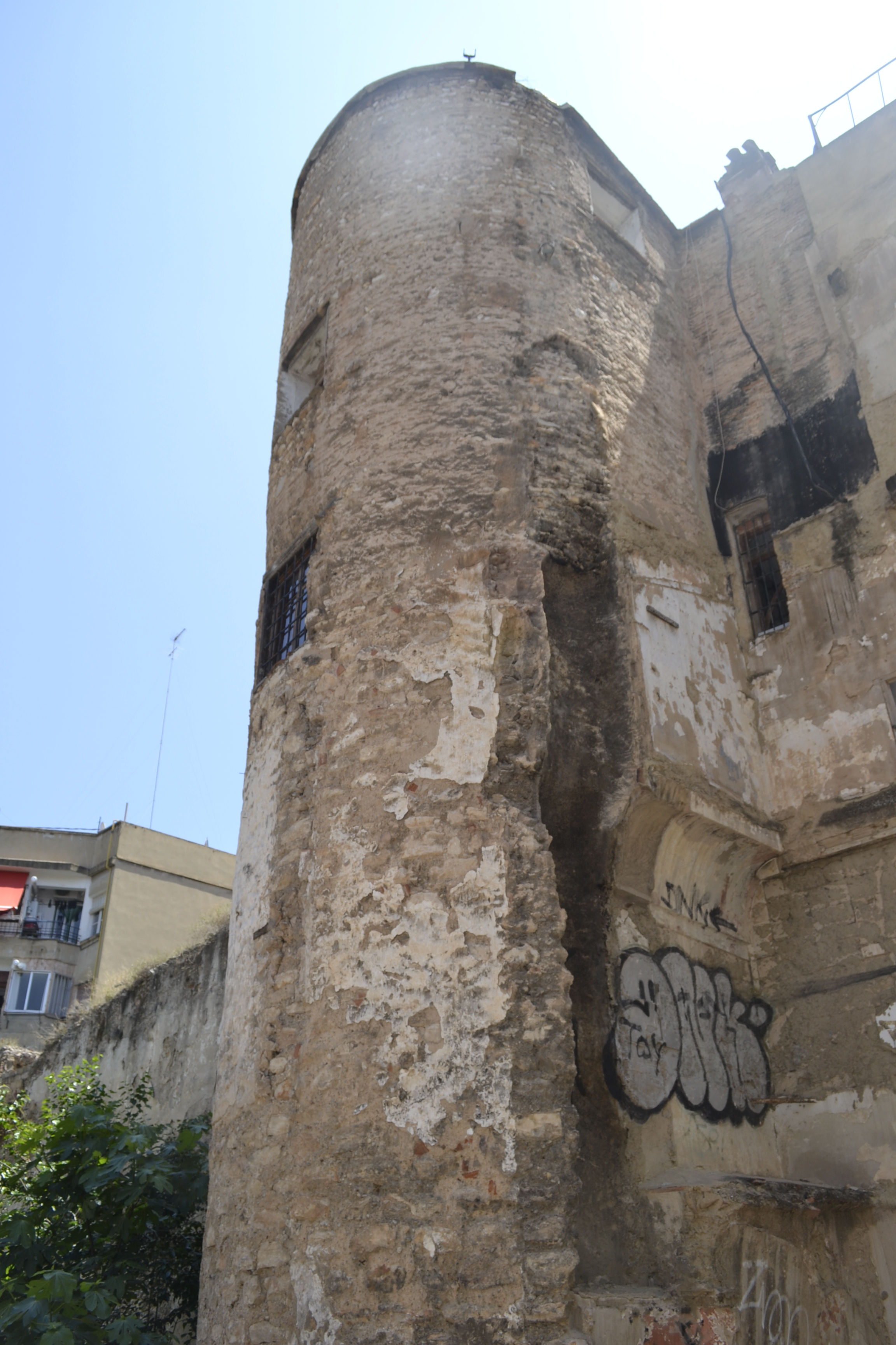 Torre de l'Àngel, València.